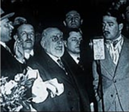 Lisandro de la Torre (1868-1939)